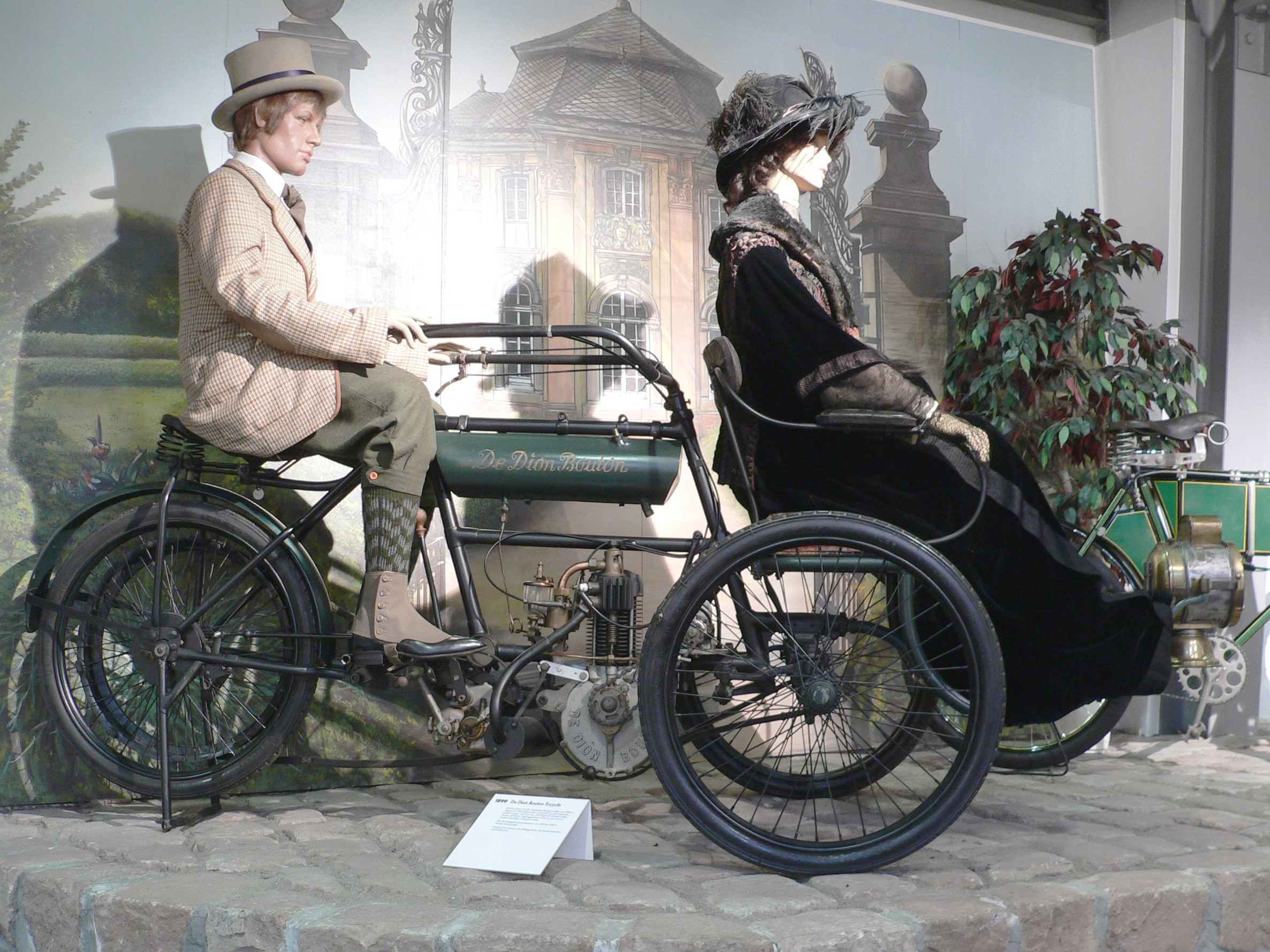 Tricycle "DeDion Bouton" (1899) at the Deutsches Zweirad- und NSU-Museum